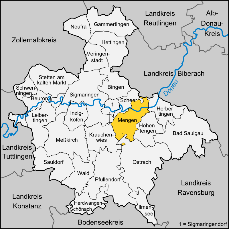 Karte der Stadt Mengen im Landkreis Sigmaringen